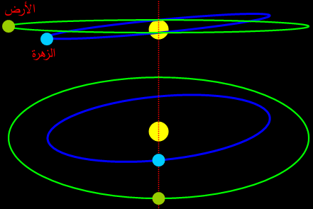 رسم يُظهر كيفيّة عبور الزهرة أمام قرص الشمس ولمَ لا تتكرر هذه الظاهرة غالبًا.